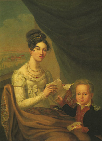 Антоний Бланк (Antony Blank) (1785 – 1844) Портрет Жозефины Фридерихс (?) с сыном Павлом Александровичем Александровым (?) в мундире офицера Польского уланского полка 1816 г. Х., м. 123х93 см Музей В.А.Тропинина и московских художников